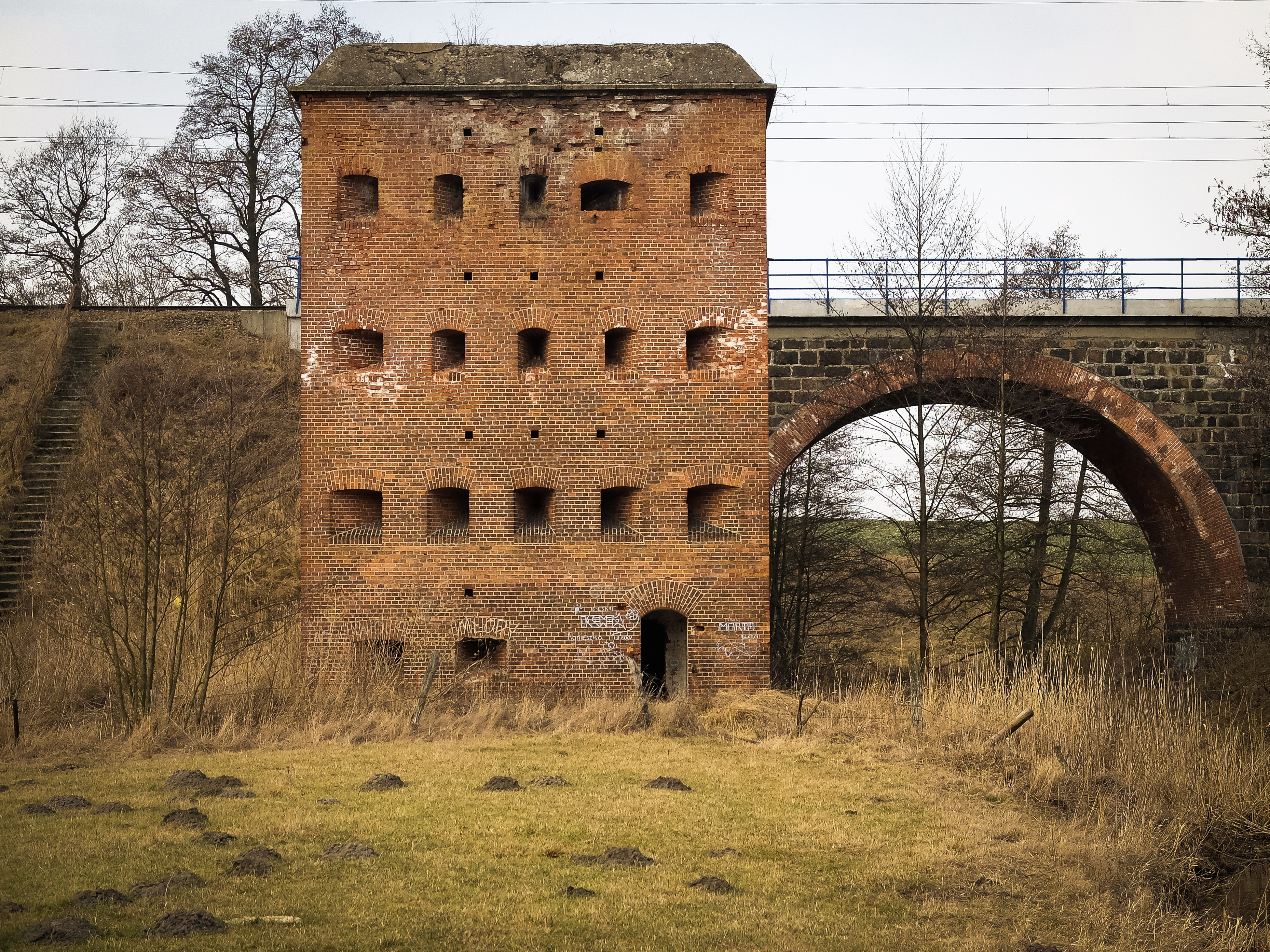 Tomaryny, wieże obronne mostu kolejowego na Pasłęce, 1901-1902